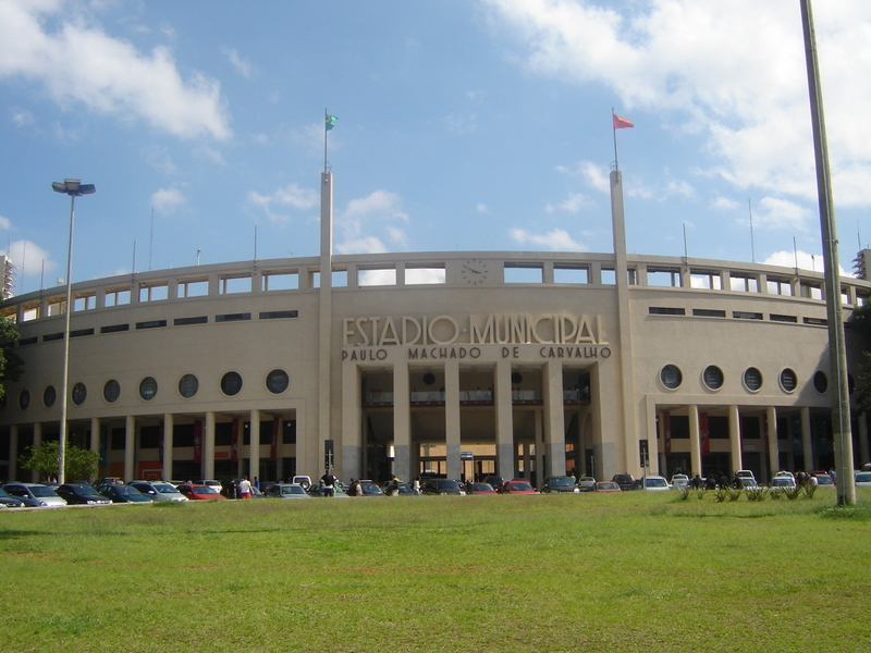 Fachada do estádio do Pacaembu em São Paulo